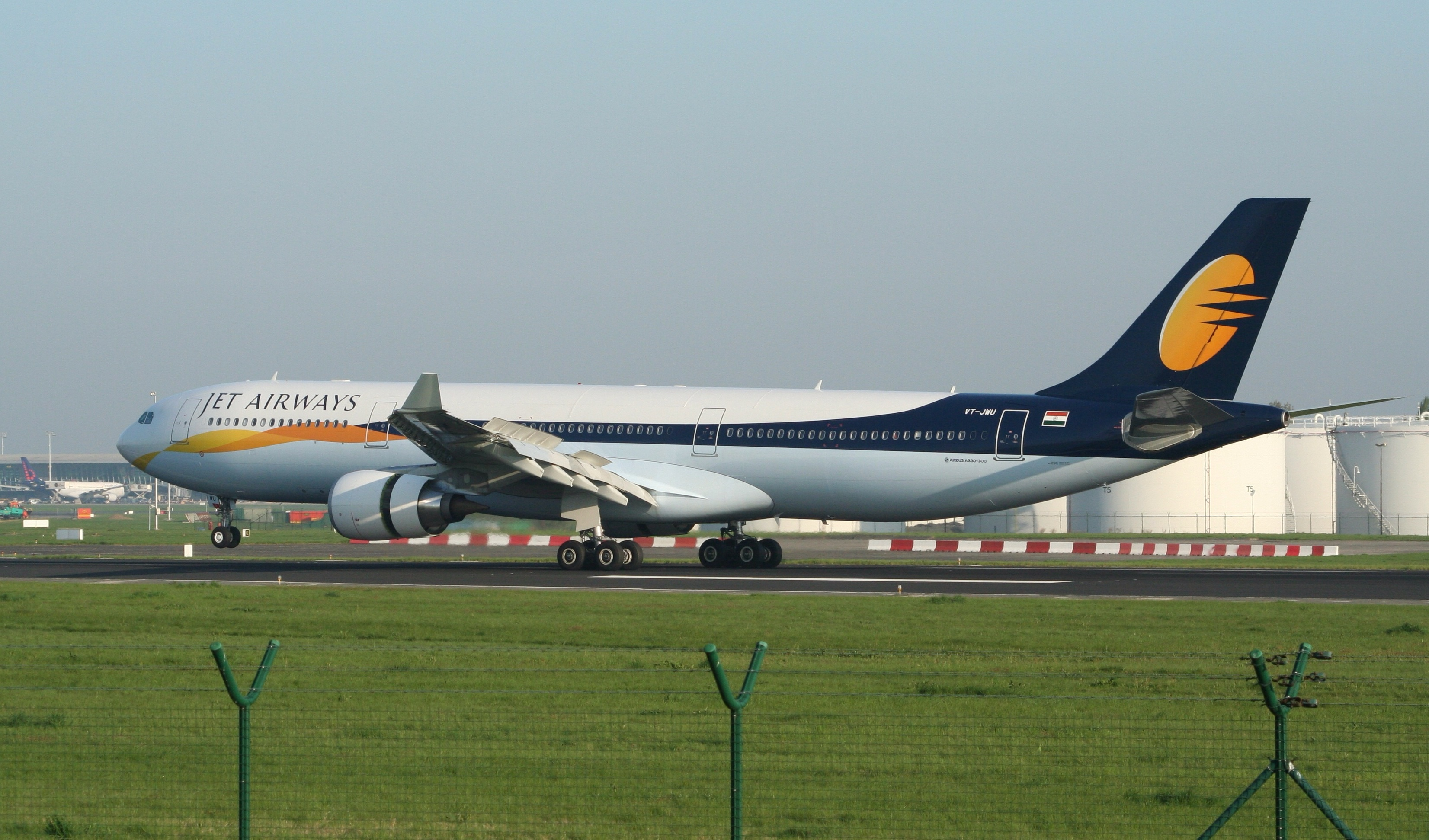 Een Airbus A330-300 van Jet Airways landt op Brussels Airport